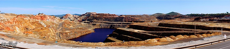 Panorámica Cerro Salomón. Riotinto, Huelva. (Spain).